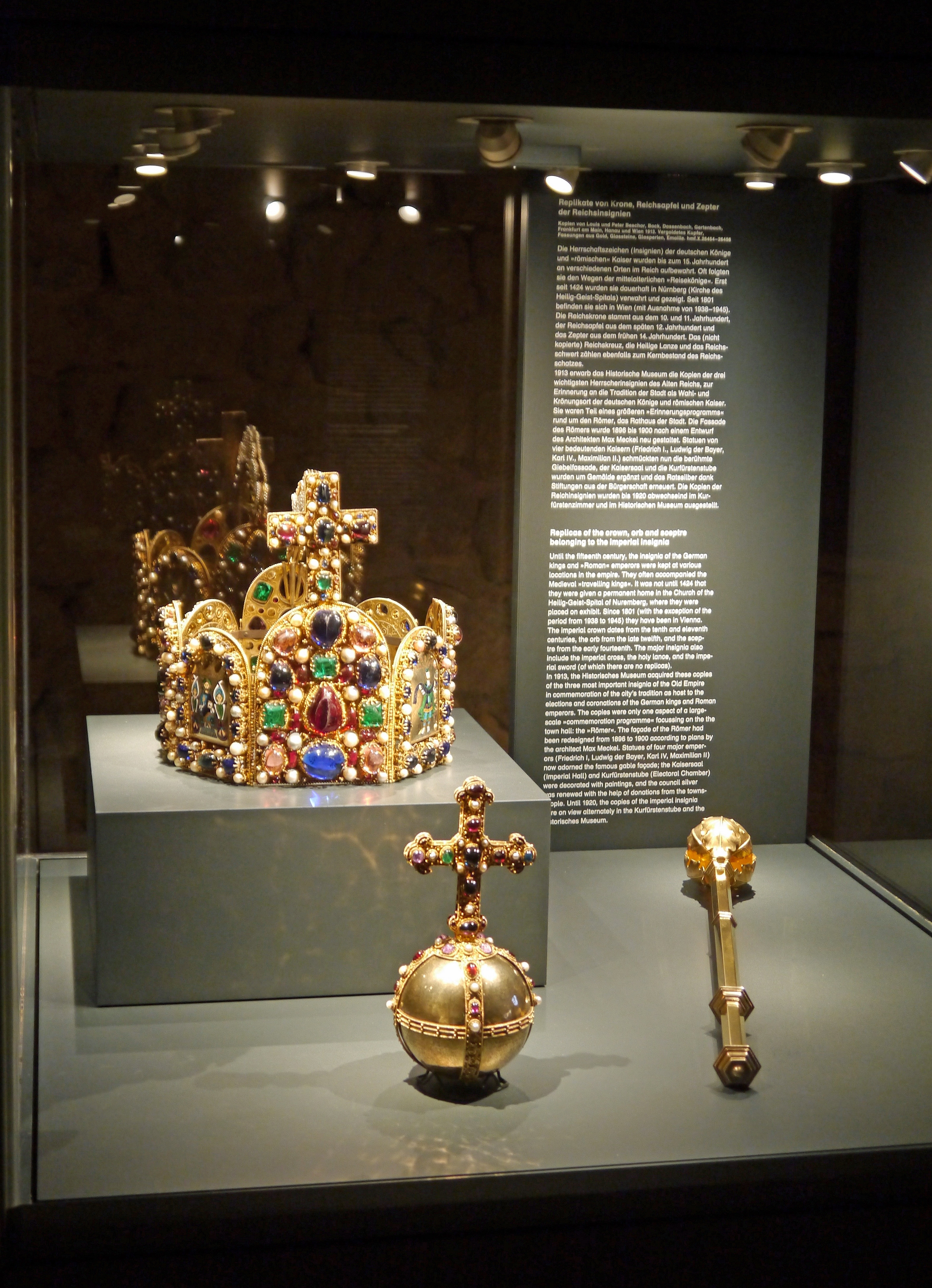 Historisches Museum Frankfurt (2013). Kopien der Reichsinsignien.